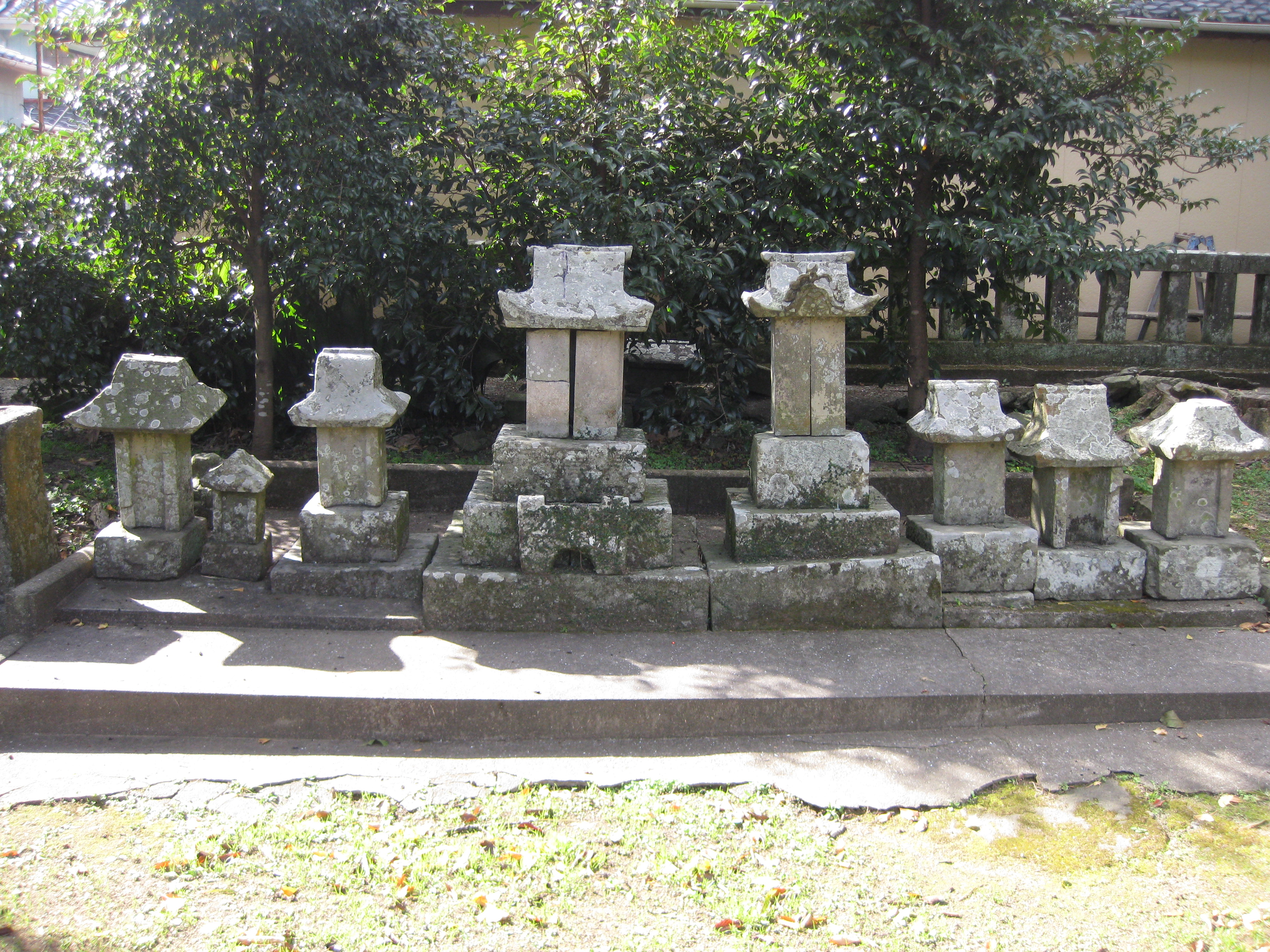 新魚目町 祖父君神社